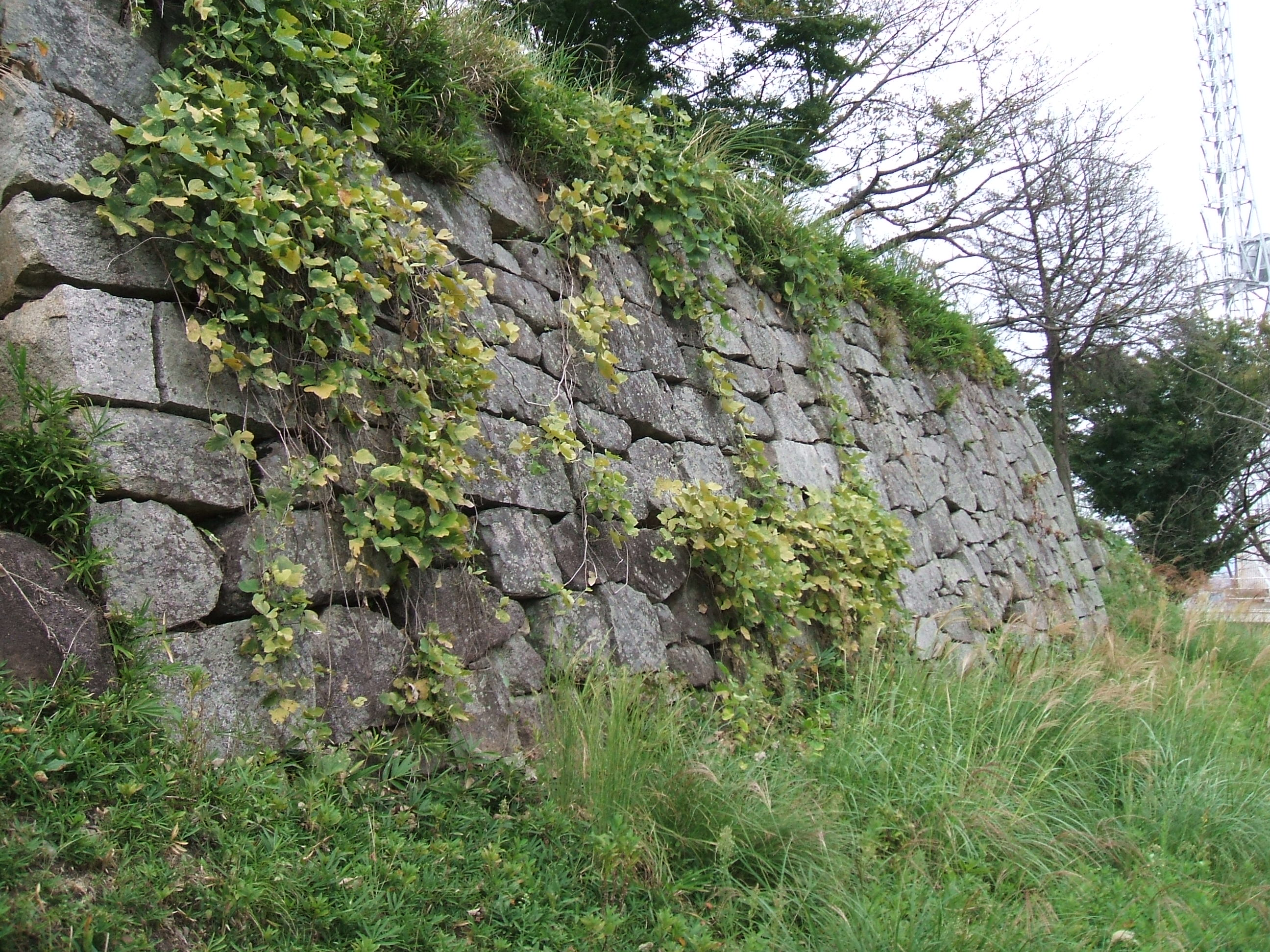 広島県福山市新市町にある相方城本郭の現状